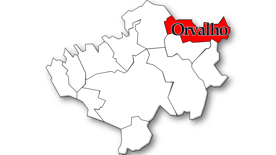 População